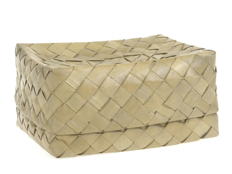 Sirihdoos. Sirihdoos Unknown language: Slepi Epok